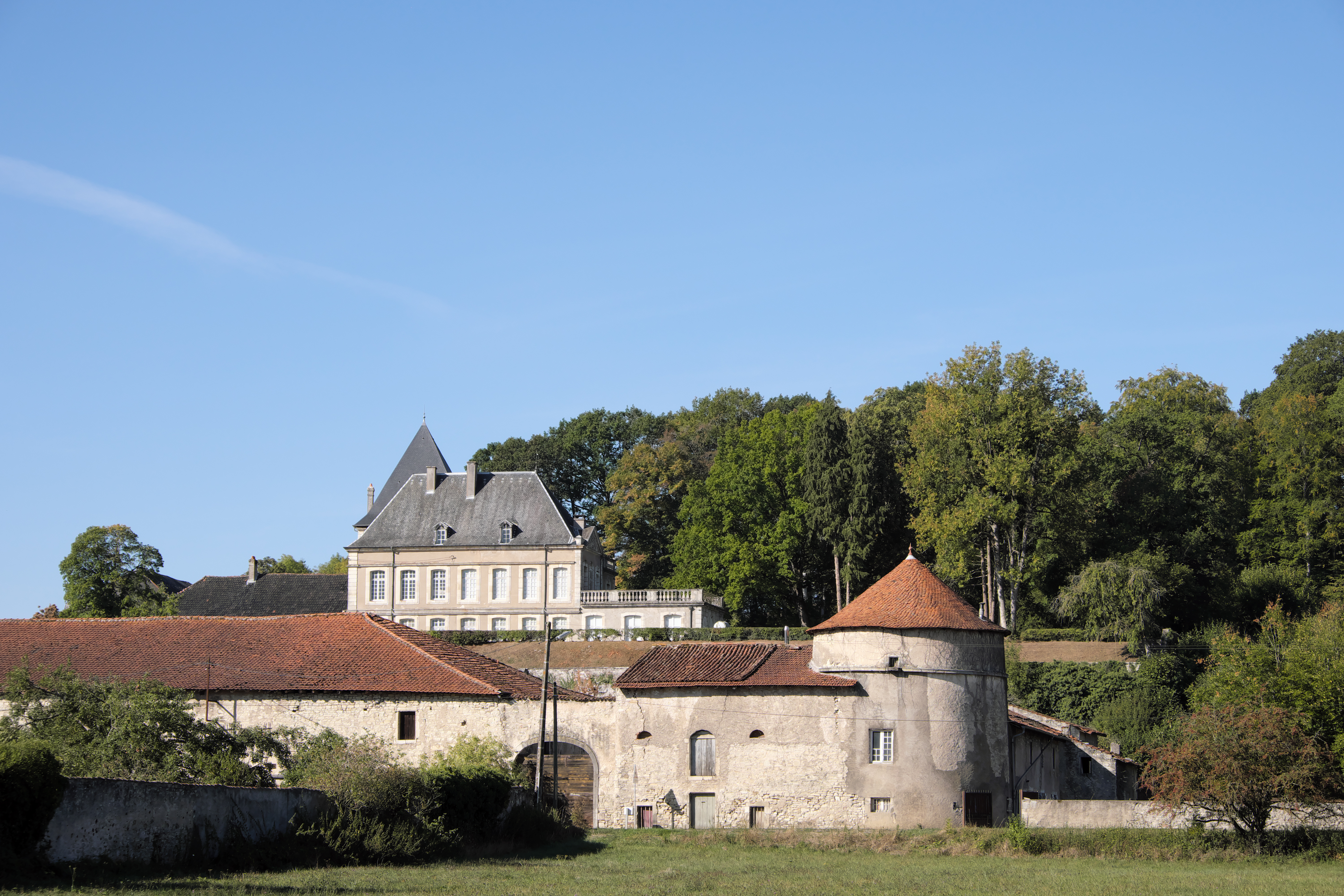 Vue générale sur le château du 18ème siècle et les fortifications médiévales à Neuviller-sur-Moselle en Meurthe-et-Moselle. .